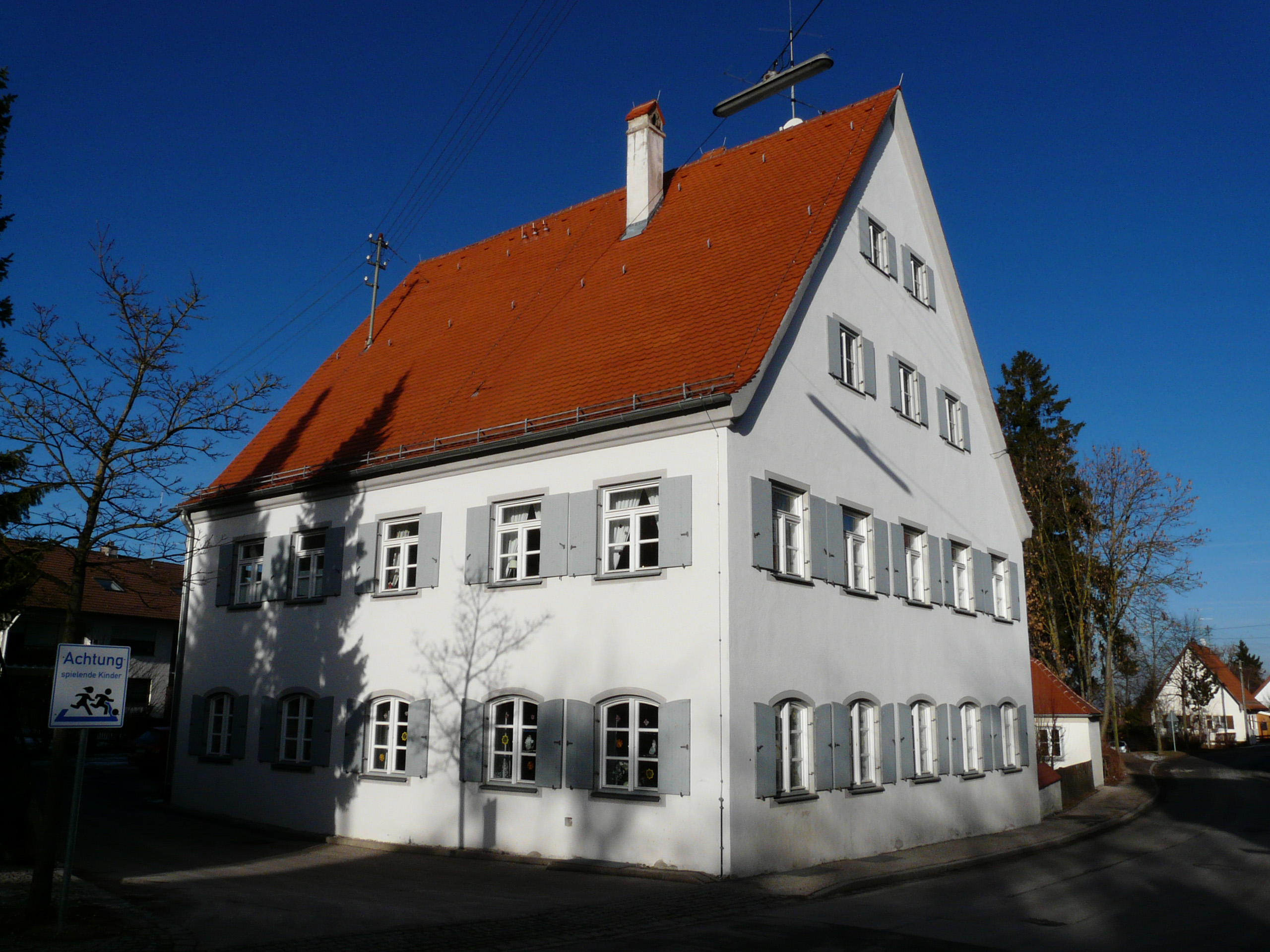 Pfarrhof in Dorschhausen, Bad Wörishofen